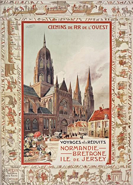 Chemins de fer de l'Ouest. Voyages à prix réduits : Normandie, Bretagne, Ile de Jersey, affiche